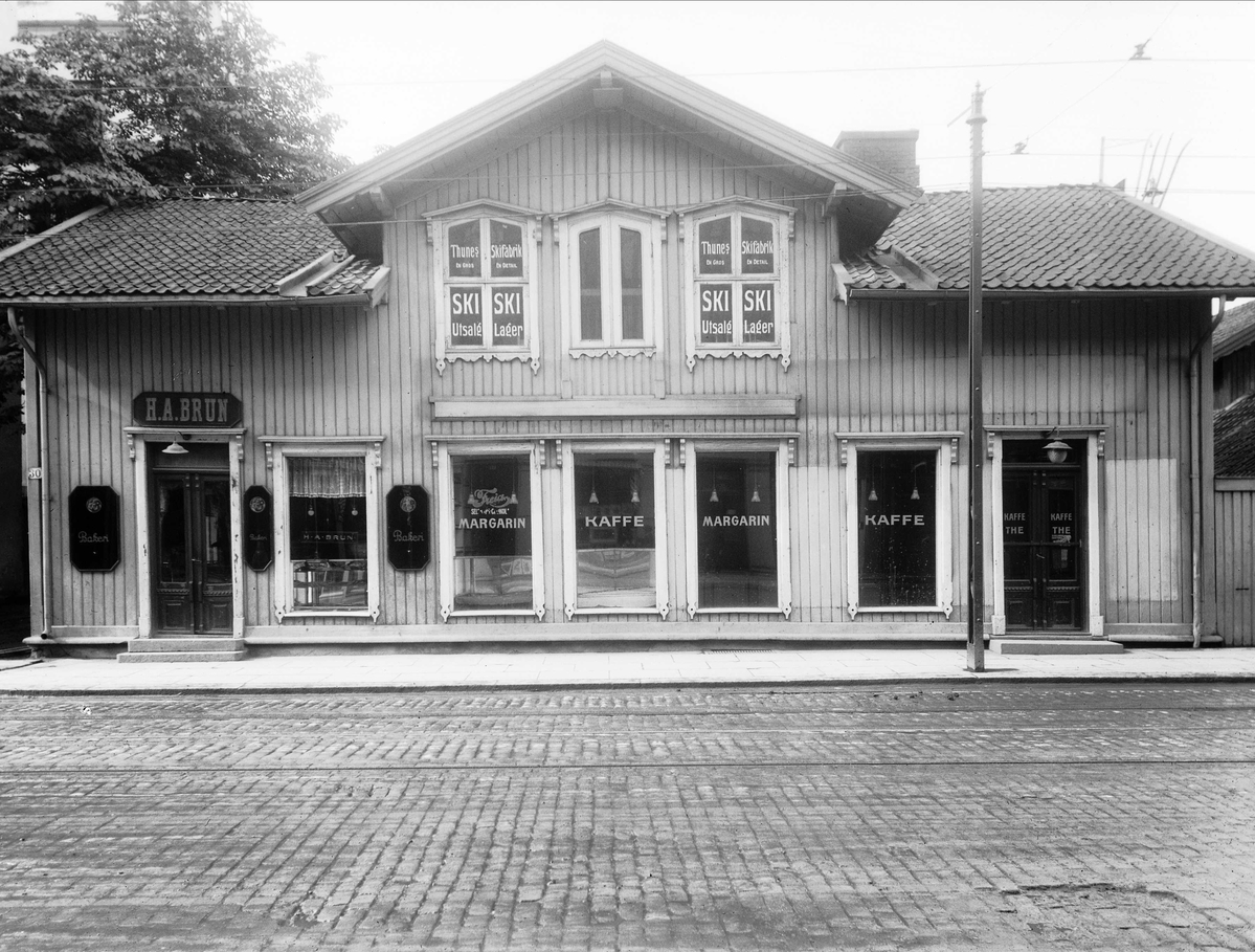 Bogstadveien 30 med bakeri for baker Brun, fotografert av Anders Beer Wilse, ca.1920. Fra Byhistorisk samling hos Oslo Museum.